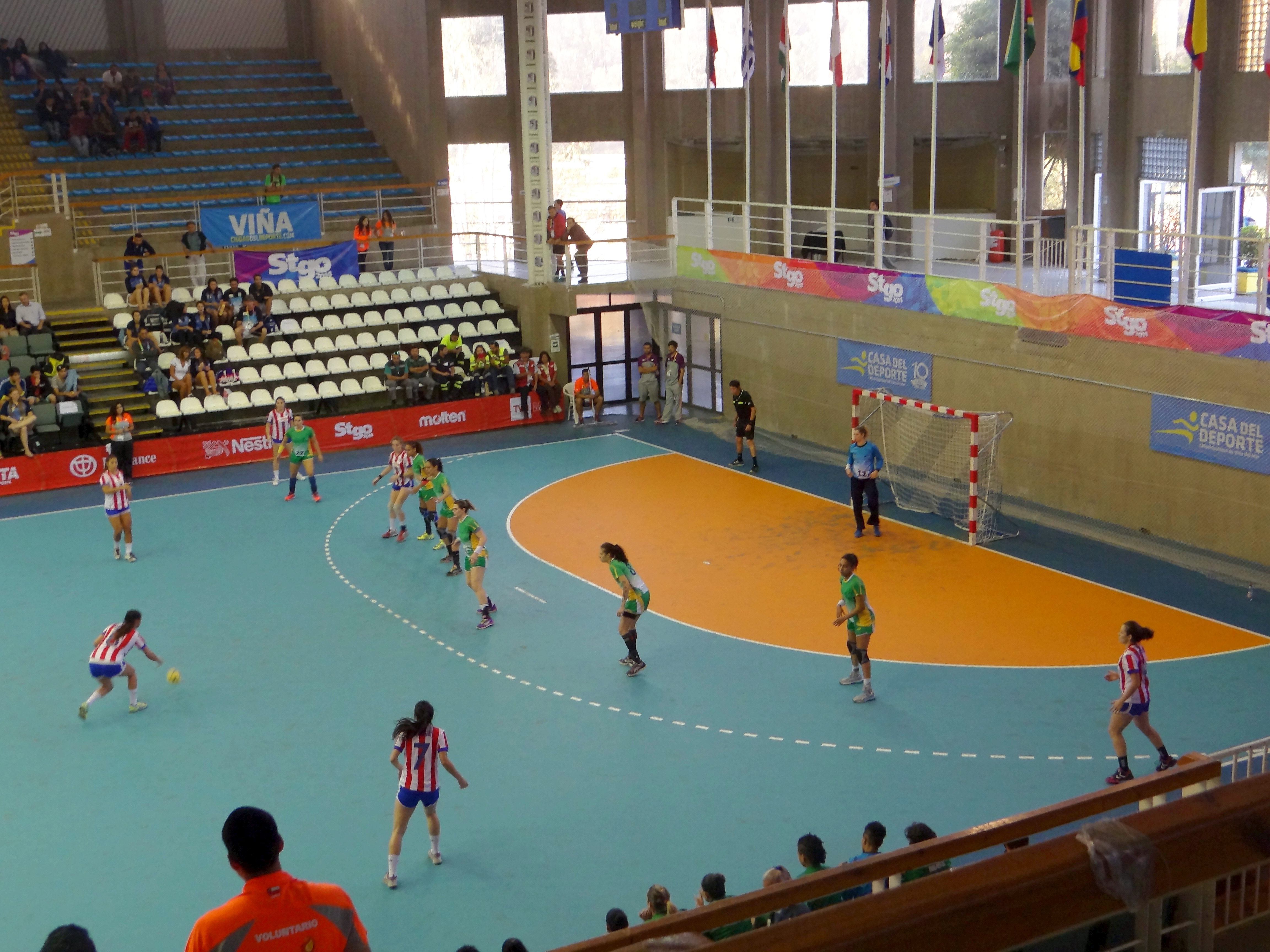 X Juegos Suramericanos Santiago 2014 Polideportivo Sausalito de Viña del Mar 11.03.2014 Balonmano femenino Brasil v. Paraguay